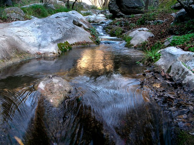 Rio Turvilla a su paso por La Fabrica de la luz